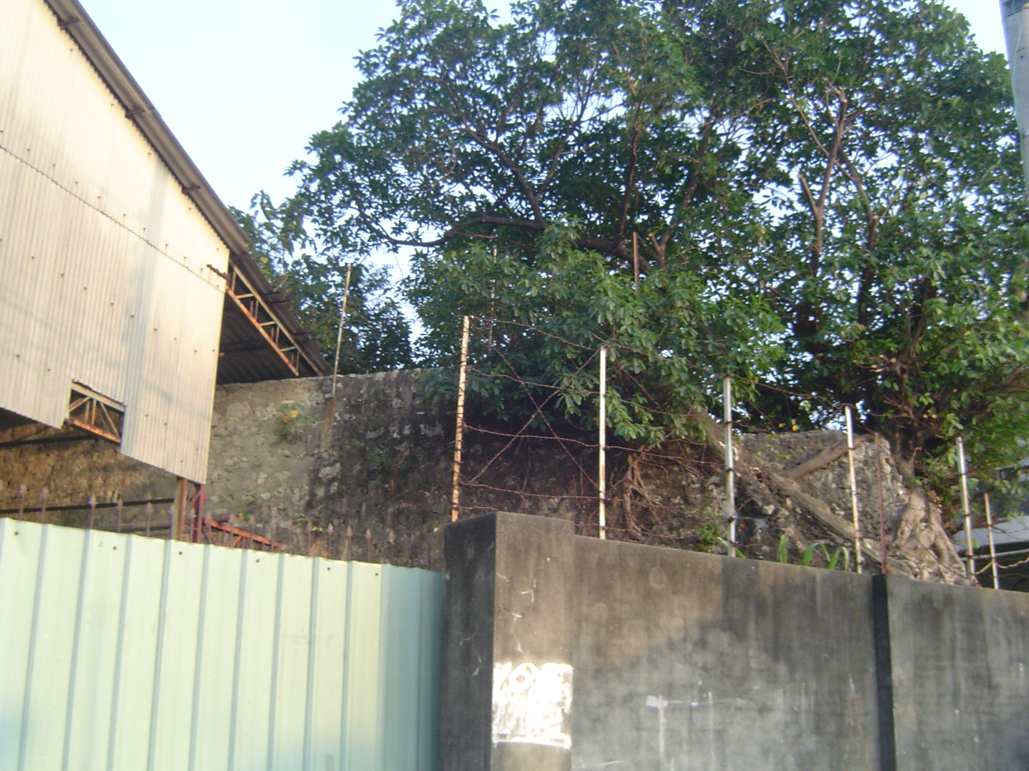 高雄市左營區鳳山縣舊城西門附近殘餘城垣，位在自助新村內。